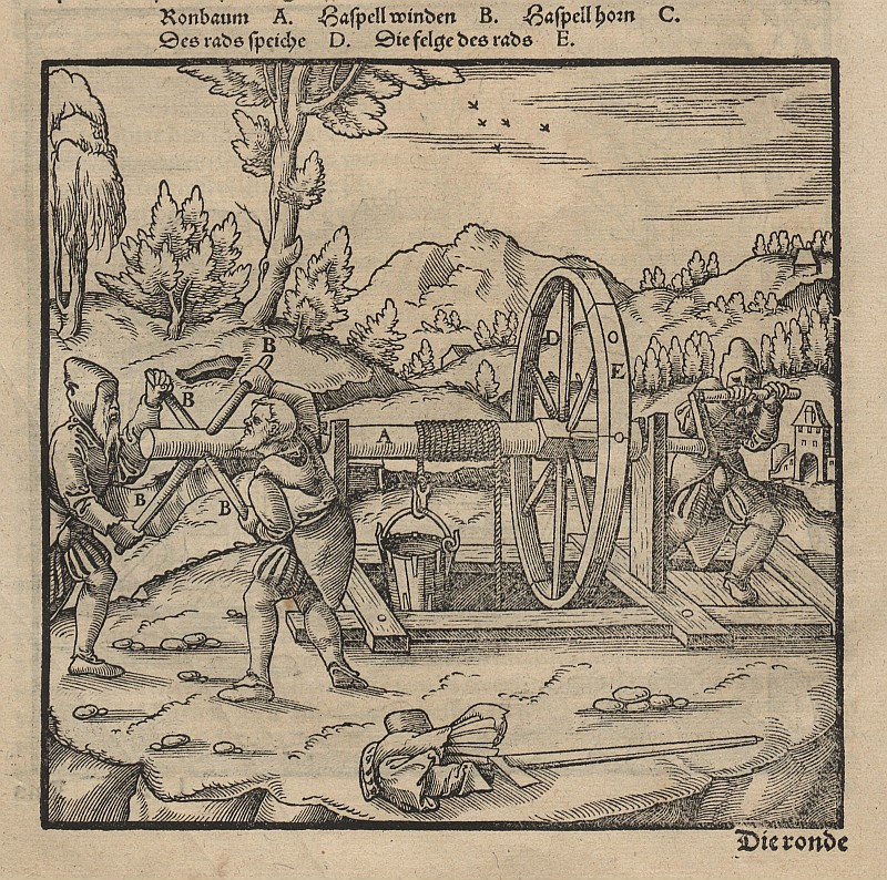 Original image description from the Deutsche Fotothek Bergwerk & Bergbau & Haspel